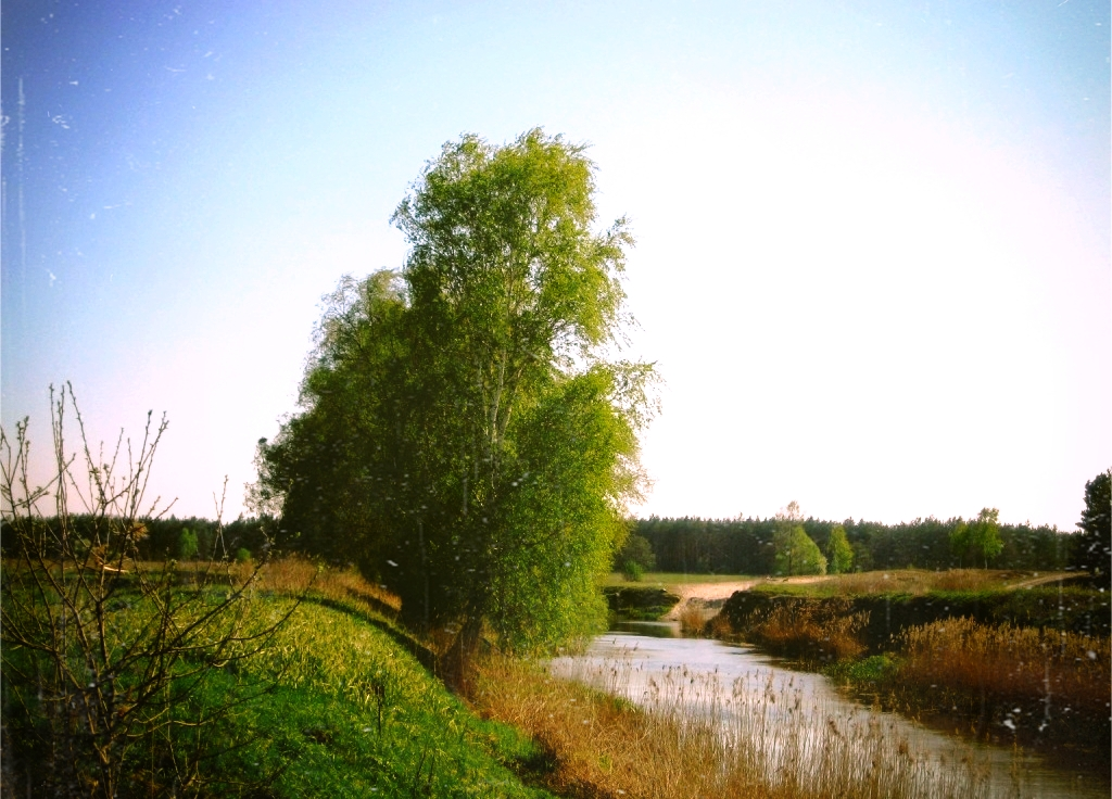 гута1